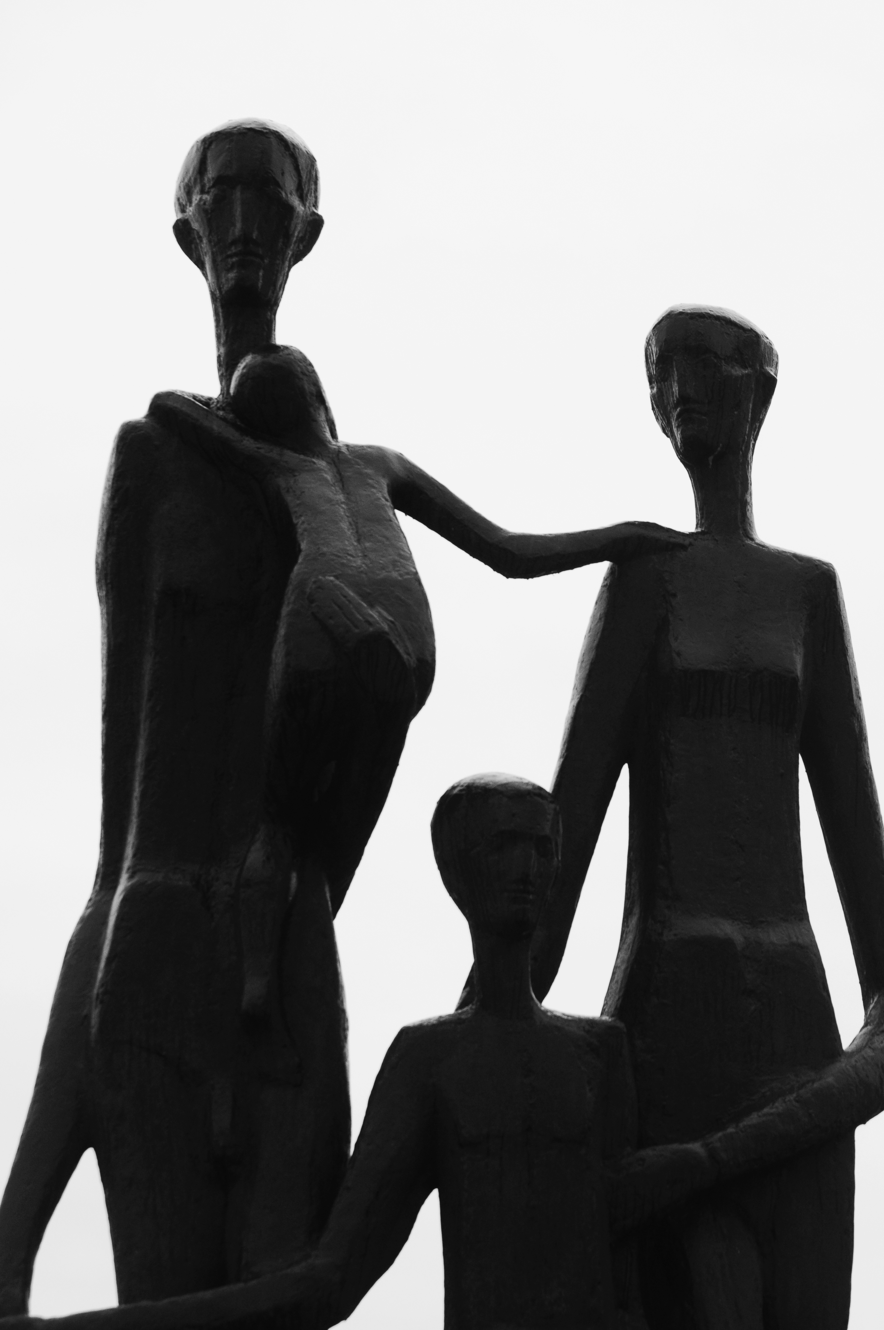 Polu-siluete...